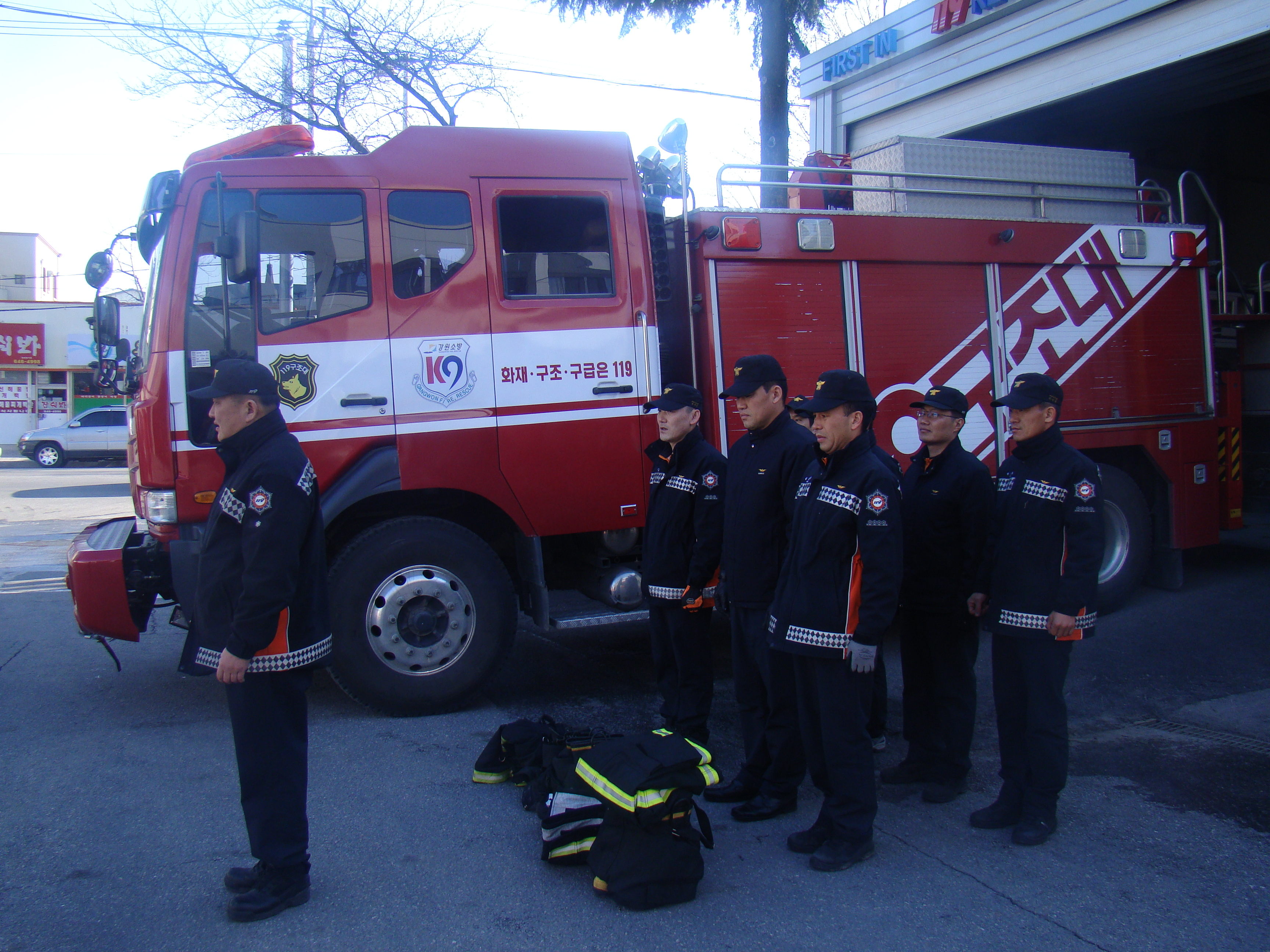 2011년 3월 16일 강릉소방서 교대점검